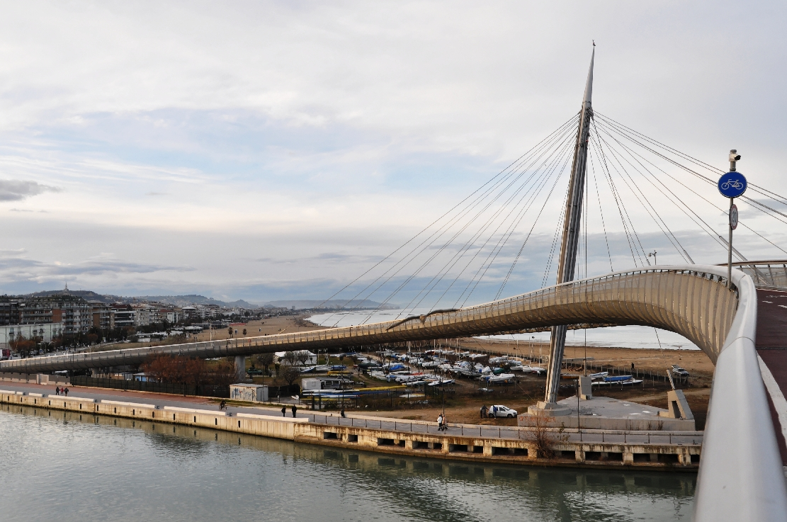 Ponte del mare Pescara Winter 2013